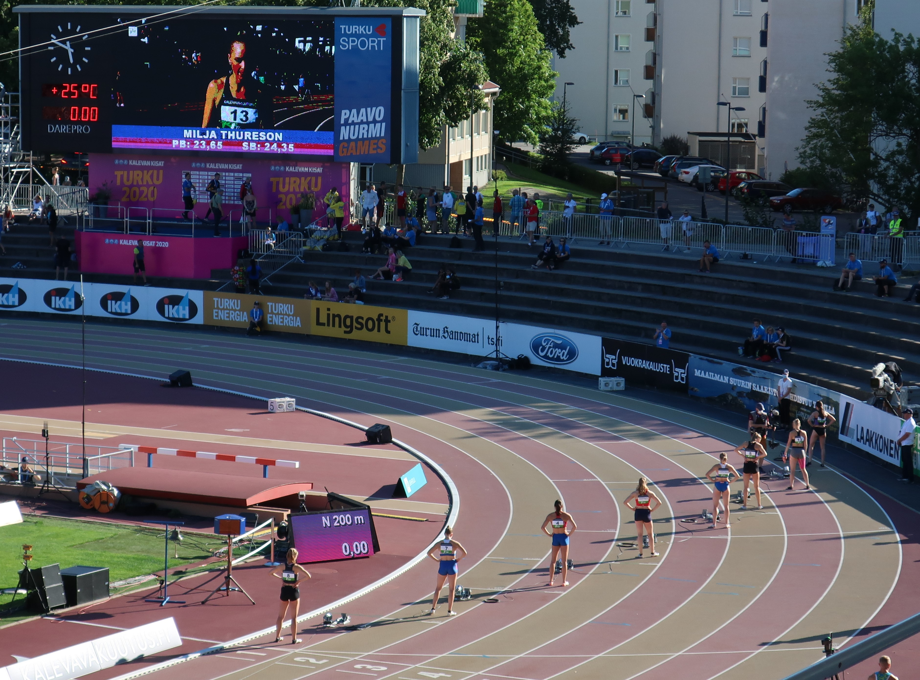 Naisten 200 metrin juoksun loppukilpailun juoksijoiden esittely Kalevan kisoissa 2020. Tulostaululla näkyy esittelyvuorossa olevan Milja Thuresonin kuva.